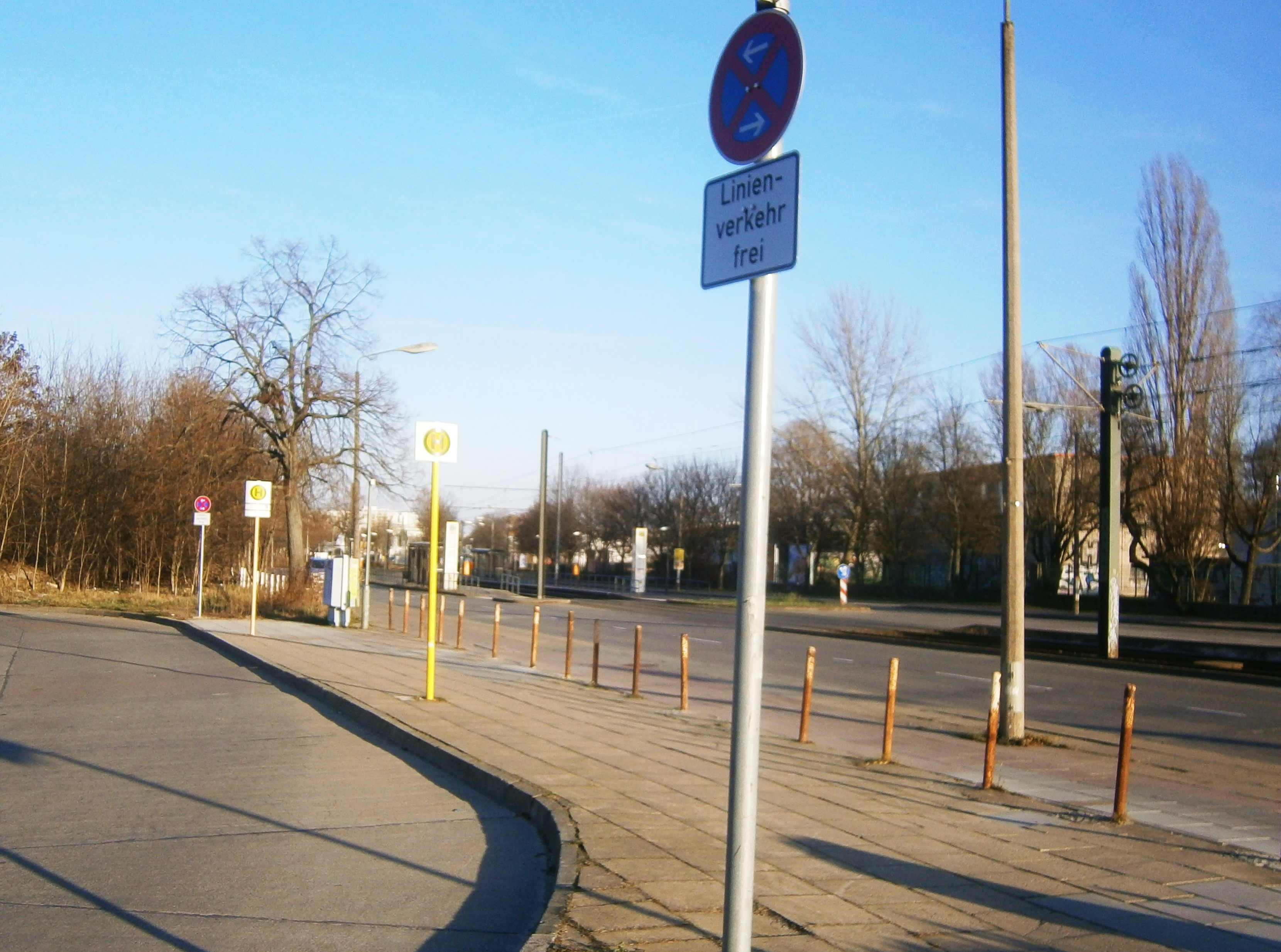 Die Hansastraße ist eine Berliner Straße mit übergeordneter Bedeutung in den Ortsteilen Alt-Hohenschönhausen und Weißensee. Sie liegt zwischen der Indira-Gandhi-Straße und der Großsiedlung Hohenschönhausen-Nord. Im Bild links die Wendeschleife am Ostende der verbliebenen Trasse der Falkenberger Straße und rechts der Blick in die Hansastraße, deren rechte Fahrbahn bis 1988 die Falkenberger Straße war.